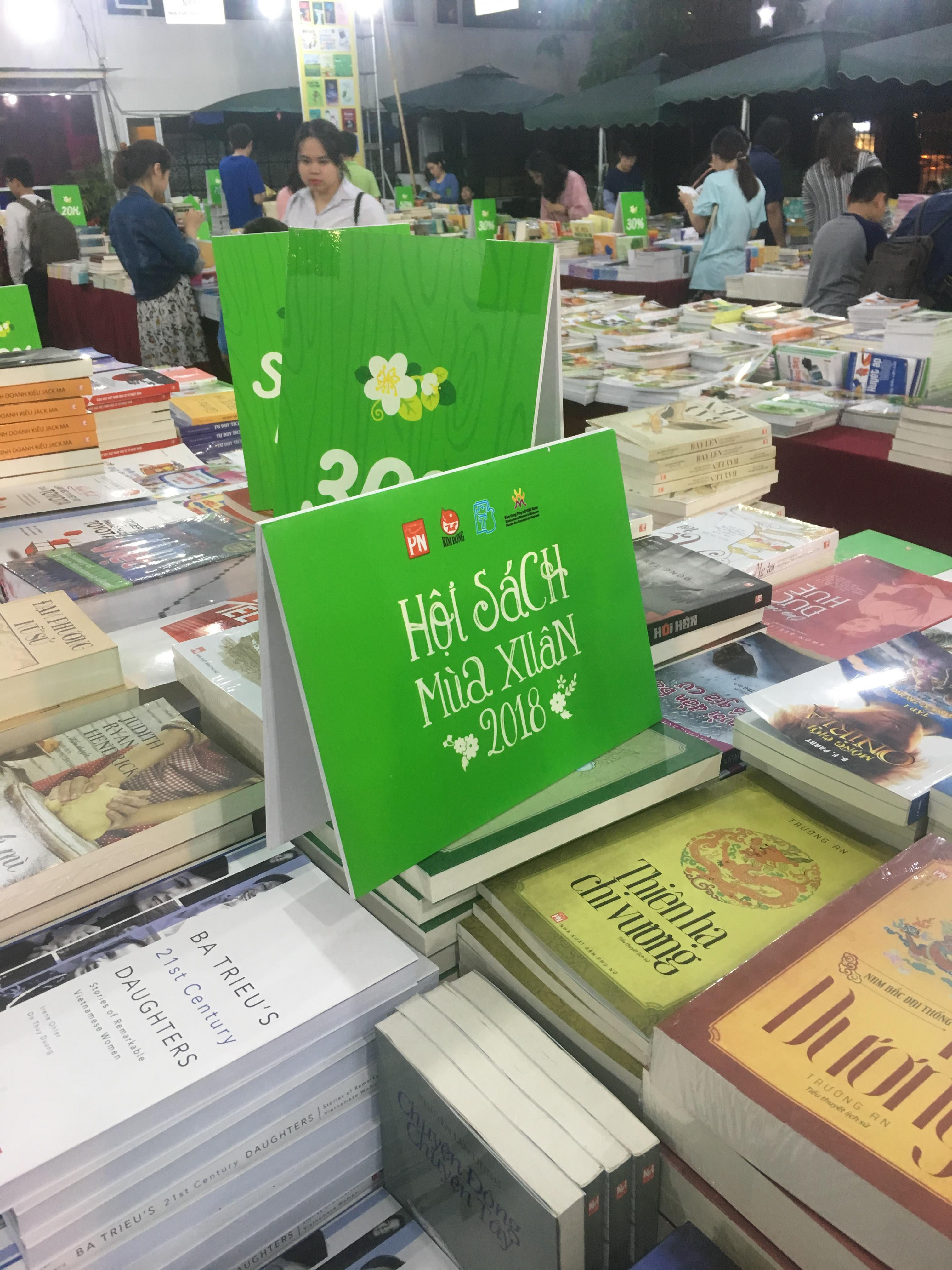 được tổ chức hàng năm